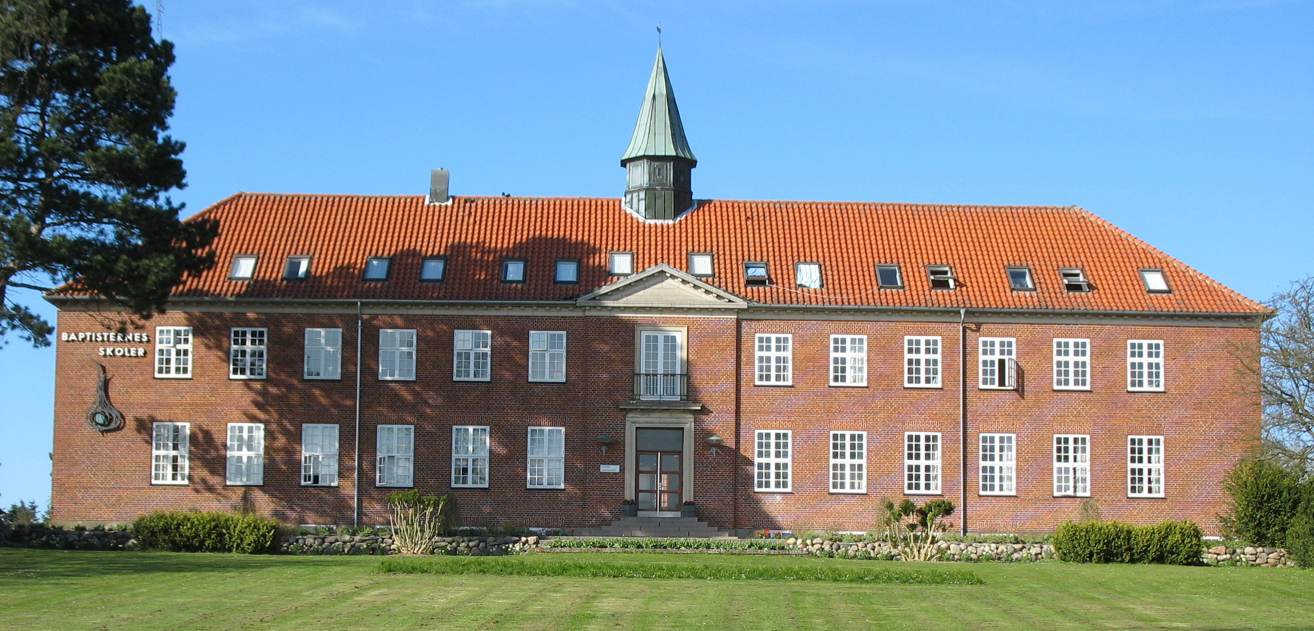 Tølløse Privat- og Efterskole (Baptisternes Skoler)